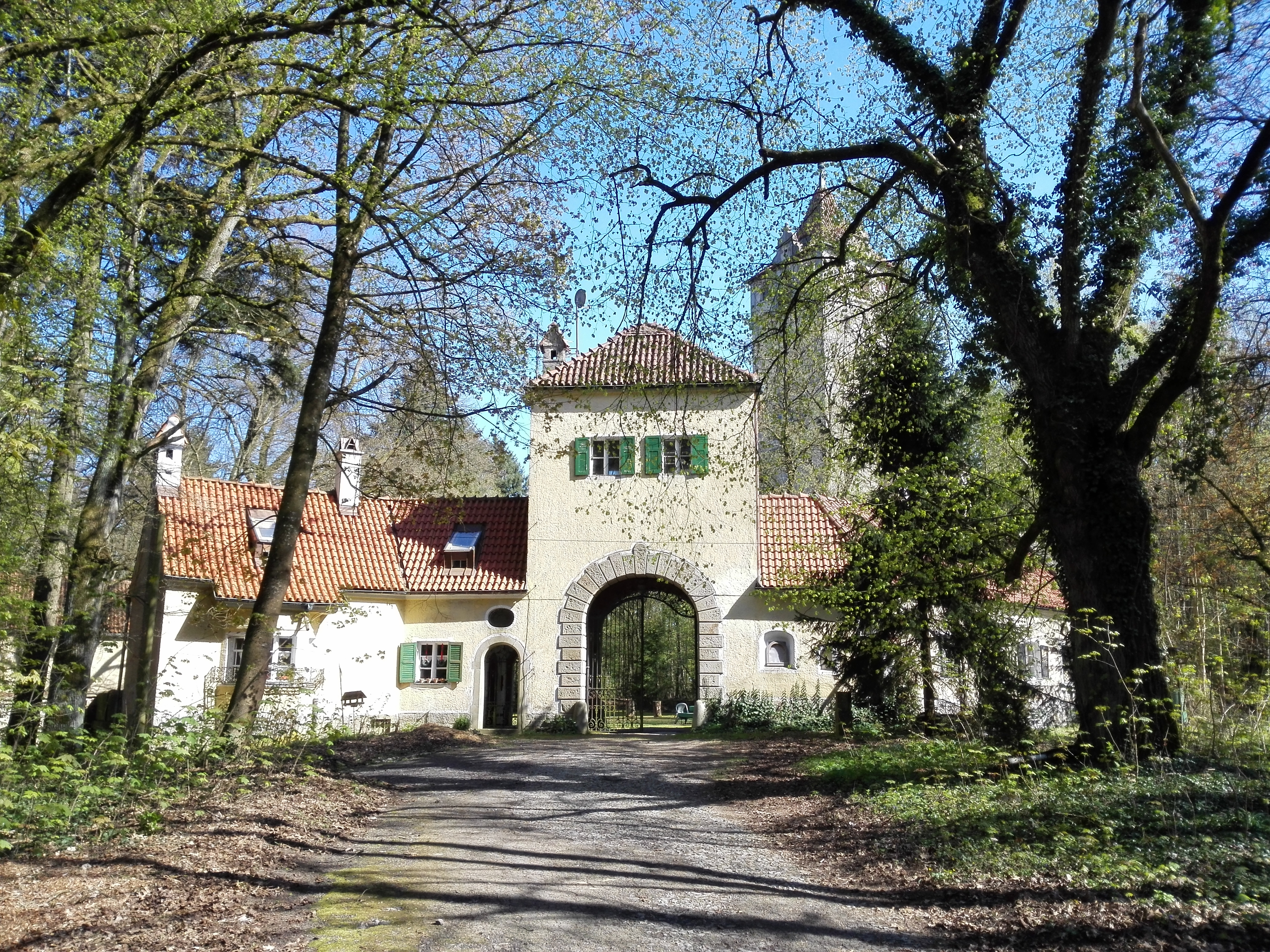 Das Haupttor